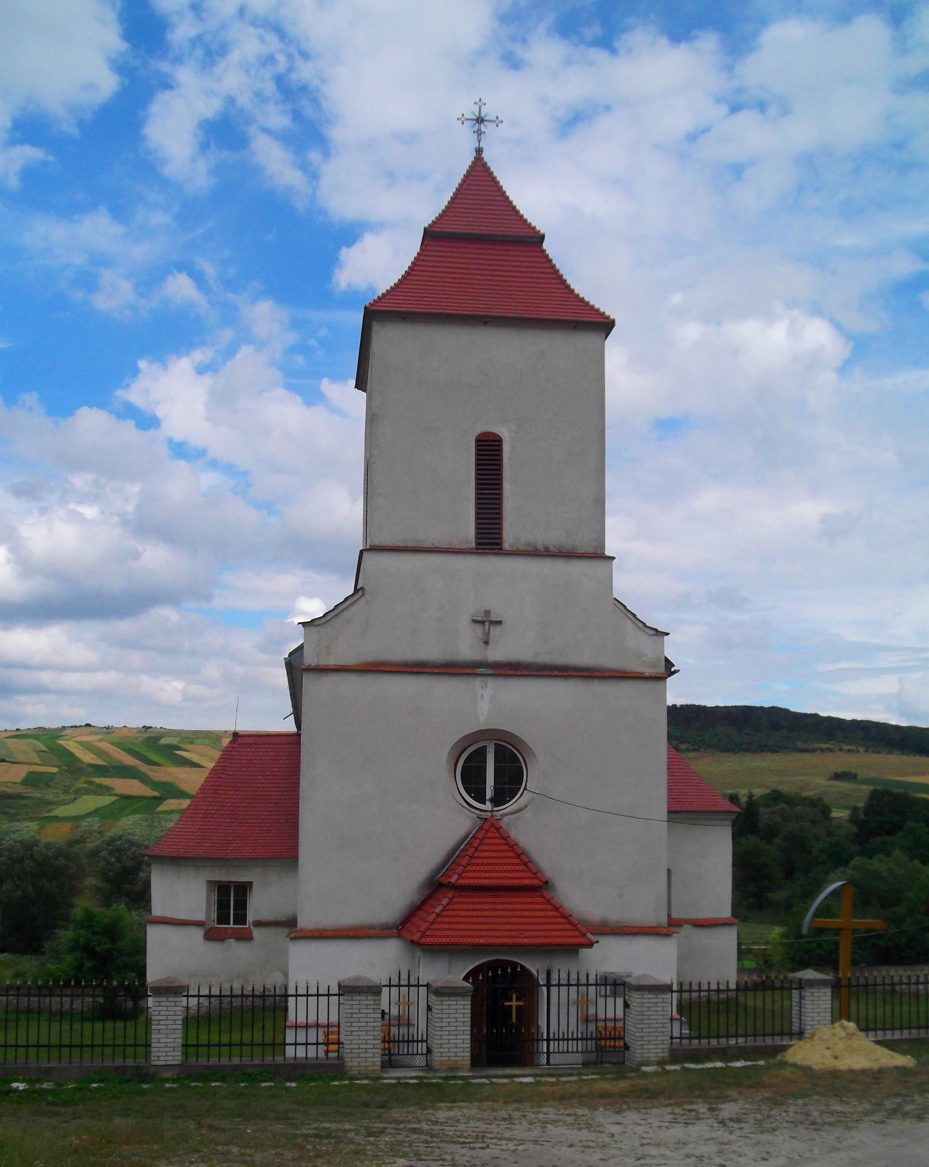 Костел св. Станіслава у селі Липівка (Рогатинський район)